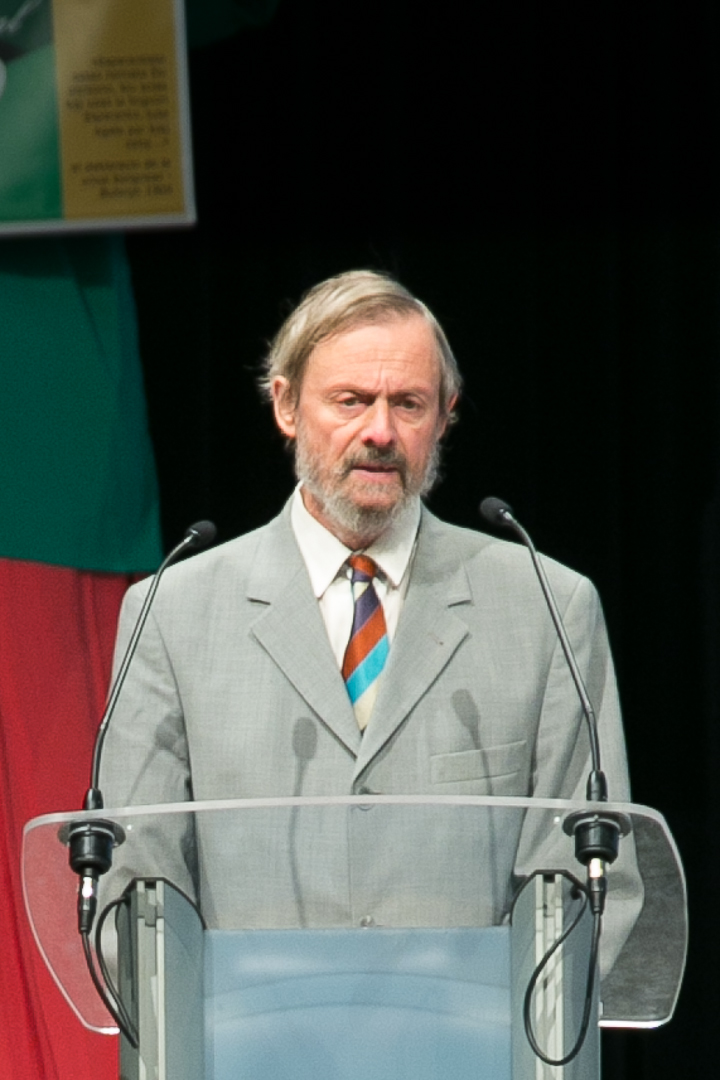 Stefan MacGill, vic-Prezidanto de UEA, dum parolado en la Solena Fermo de la 100a Universala Kongreso de Esperanto, Lillo (Francio), 2015.